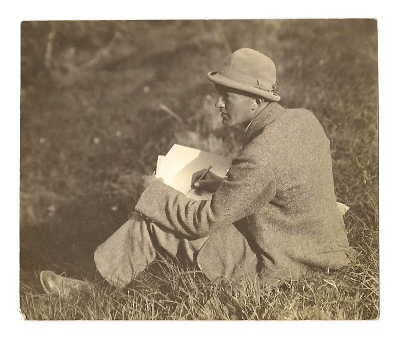 Ein Foto des österreichischen Malers und Radierers Otto Trubel.